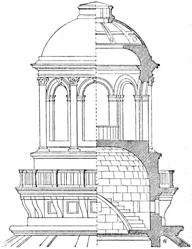 Coupe et élévation de la lanterne qui surmonte le dôme du Panthéon de Paris